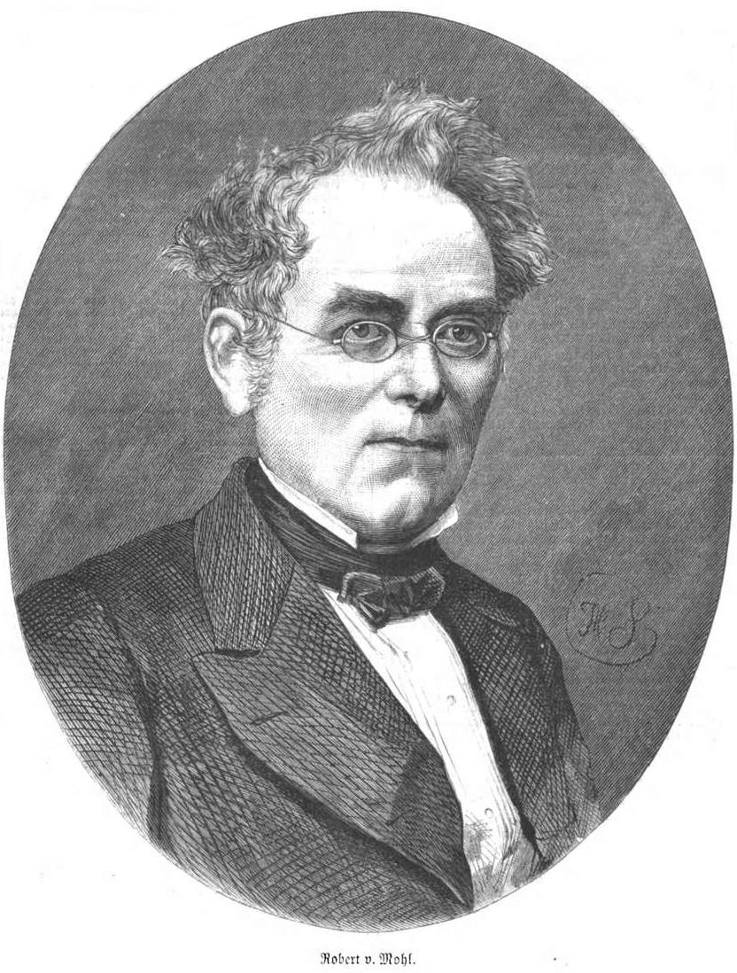 Robert von Mohl, deutscher Staatswissenschaftler im 19. Jh.